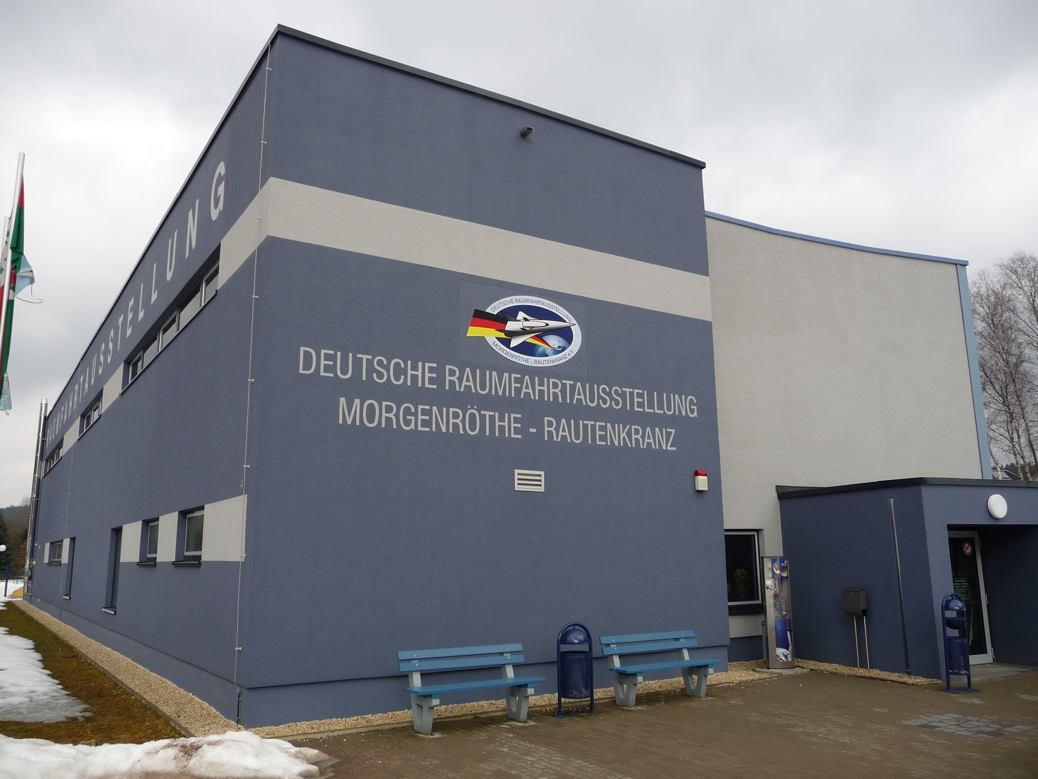 Deutsche Raumfahrtausstellung in Morgenröthe-Rautenkranz